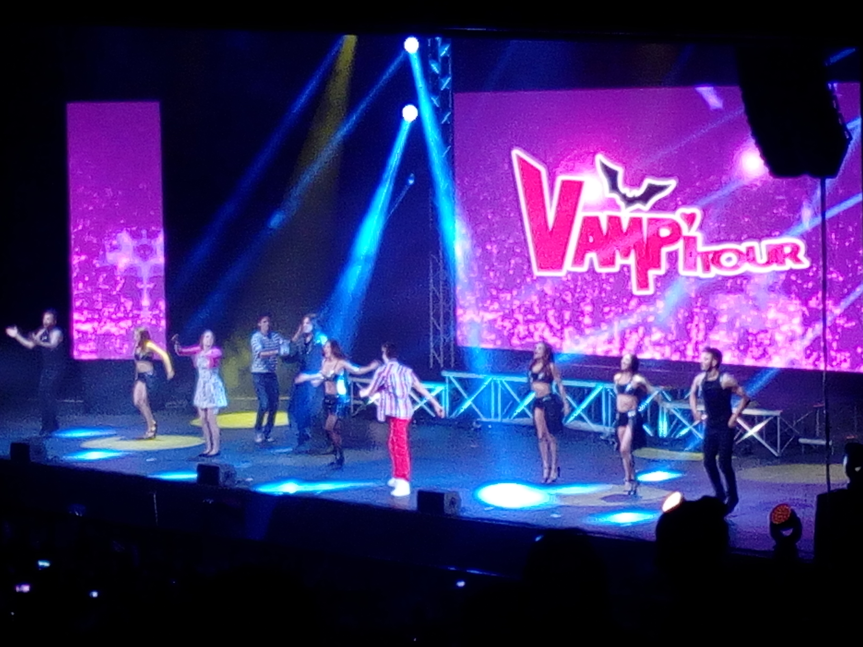 Spectacle du Vampitour au Liberté à Rennes, le 22 octobre 2016